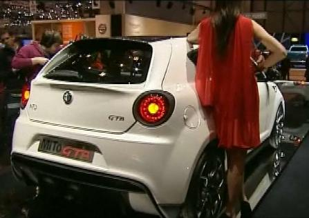 Alfa Romeo MiTo GTA Concept au Salon de Genève 2009